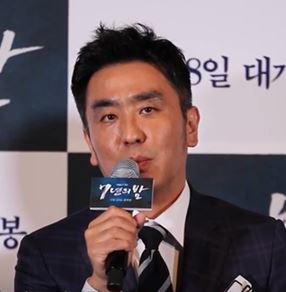 21일 오후 서울시 용산구 CGV 용산아이파크몰에서 영화 '7년의 밤' 언론 시사회와 기자 간담회가 열려 추창민 감독, 류승룡, 장동건, 송새벽, 고경표 배우가 참석하였다.